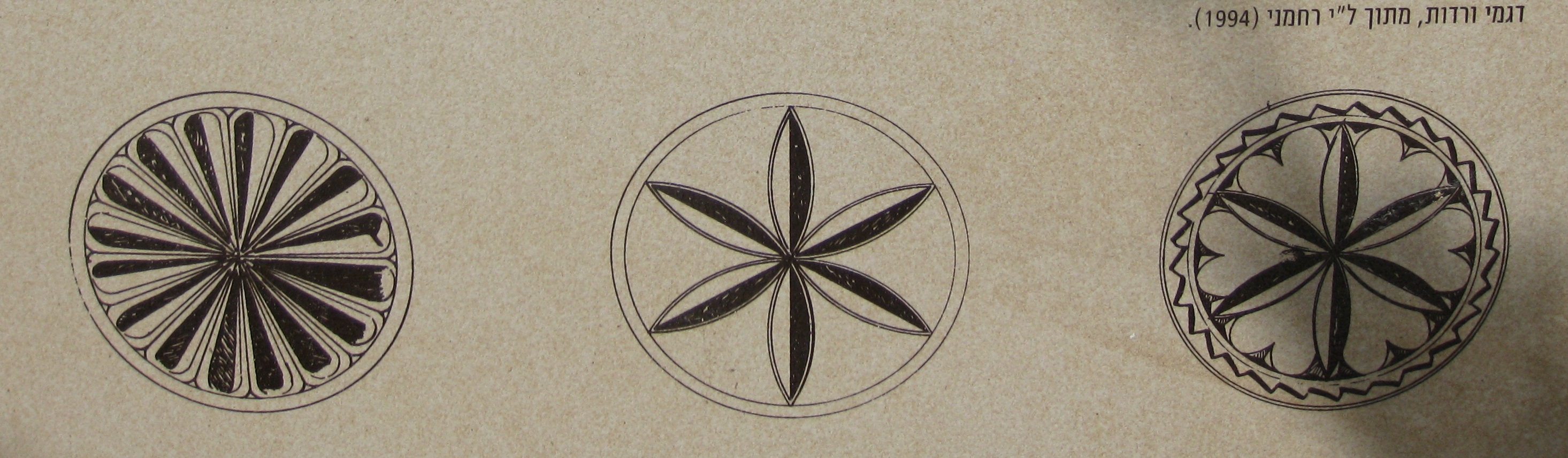 Mount Scopus הר הצופים